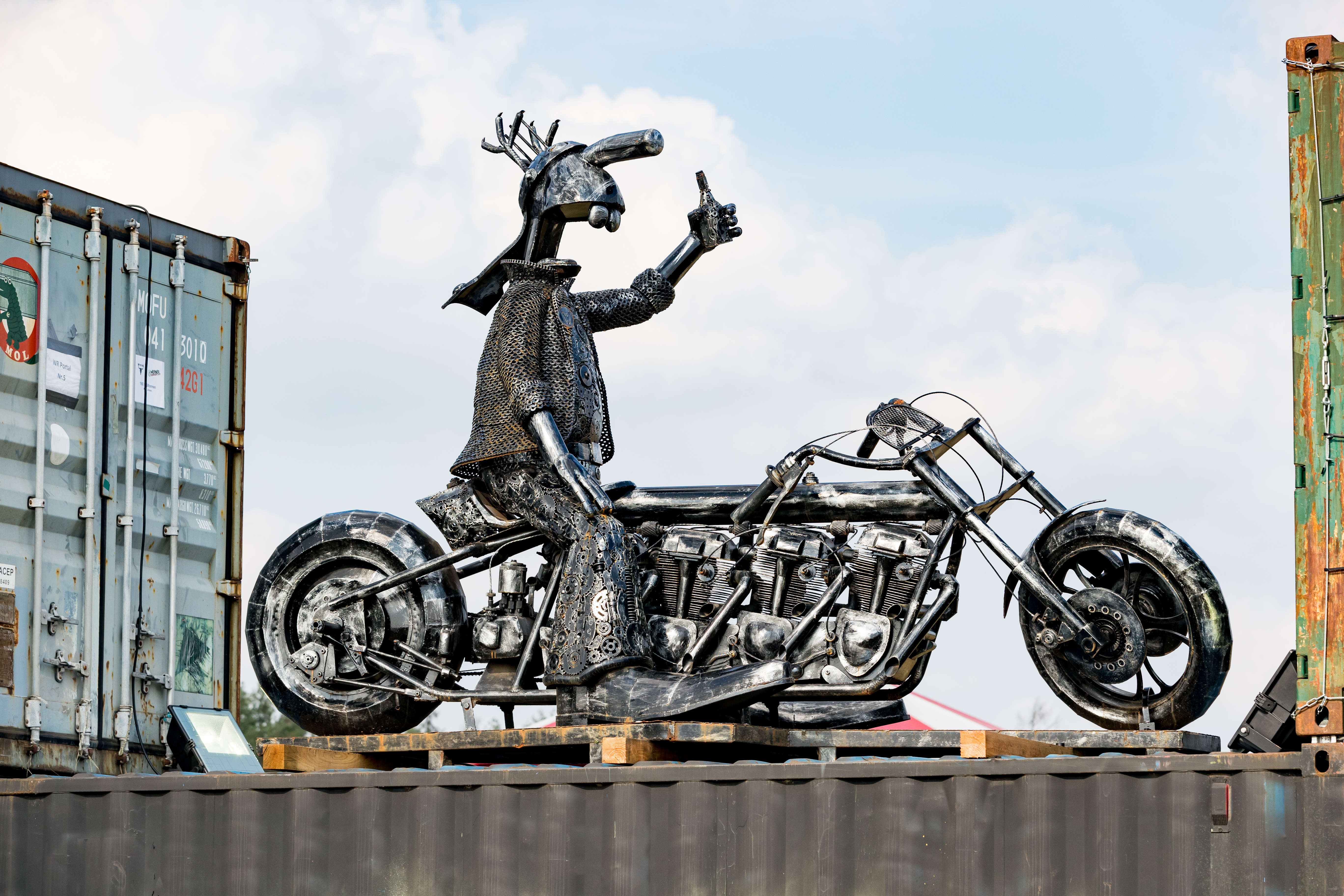 Festivalgelände during Werner Rennen at Flugplatz Hartenholm, Hasenmoor, Schleswig-Holstein, Germany on 2019-08-29, Photo: Sven Mandel